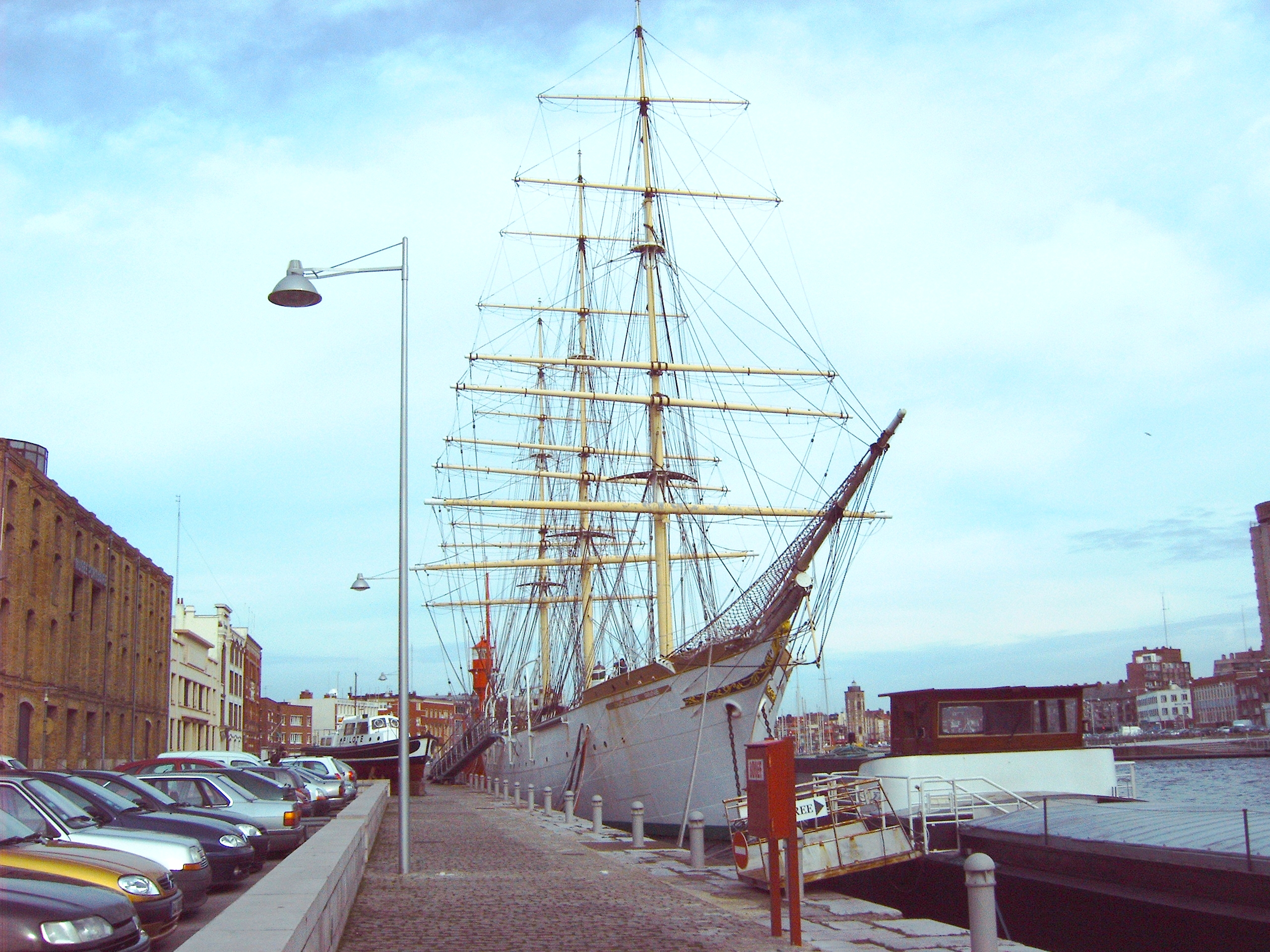 trois-mâts carré Duchesse Anne (Musée portuaire de Dunkerque, Nord, France).